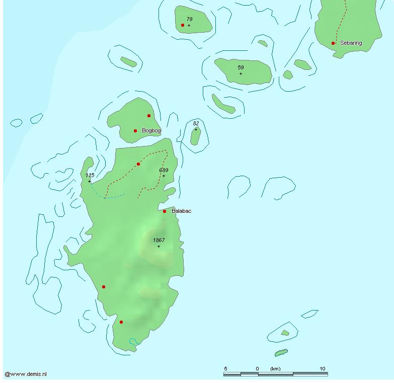 Balabac & Ramos (Philippines)